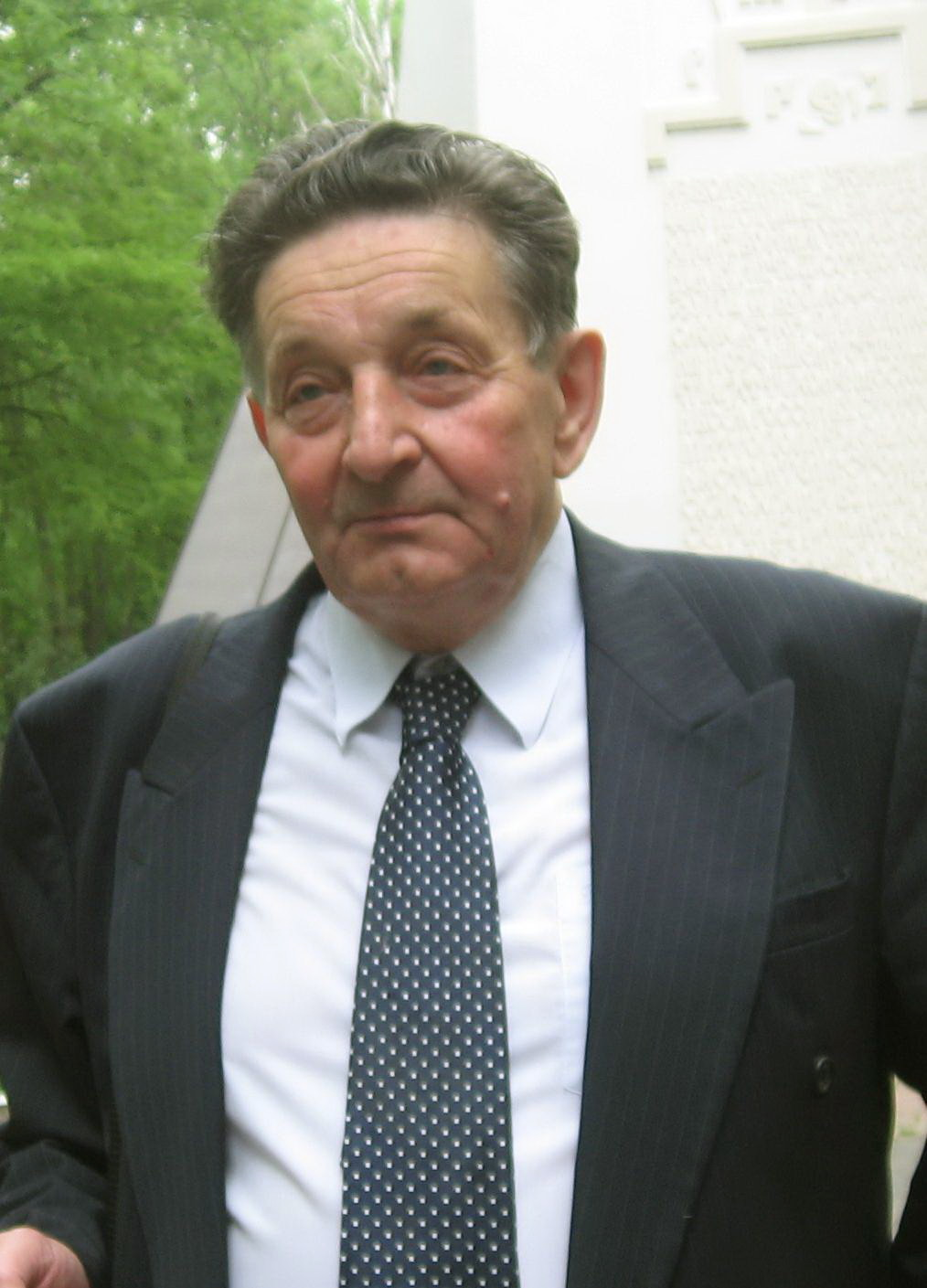 Jan Skácel